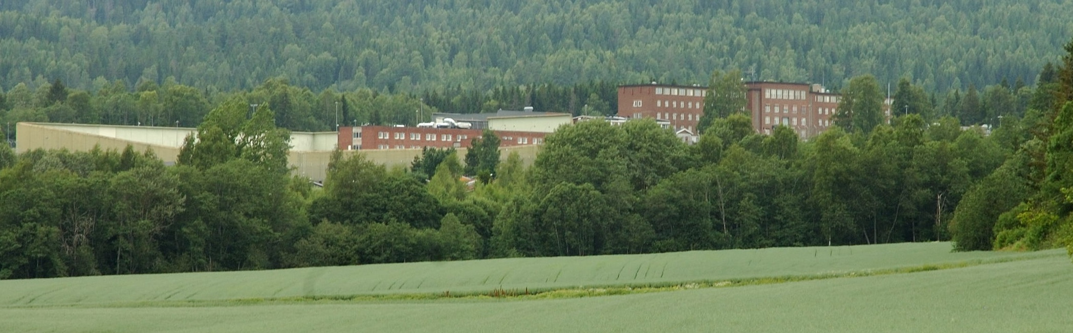 Ila Jail in Baerum in Norway Ila fengsel, forvaring- og sikringsanatalt